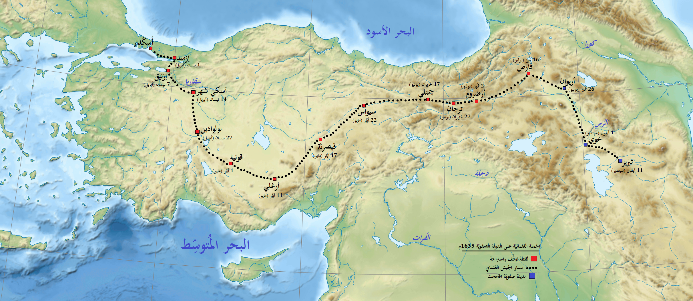 خارطة تُبيِّن مسير الجيش العُثماني من أُسكُدار إلى تبريز لِحرب الصفويين، سنة 1635م.